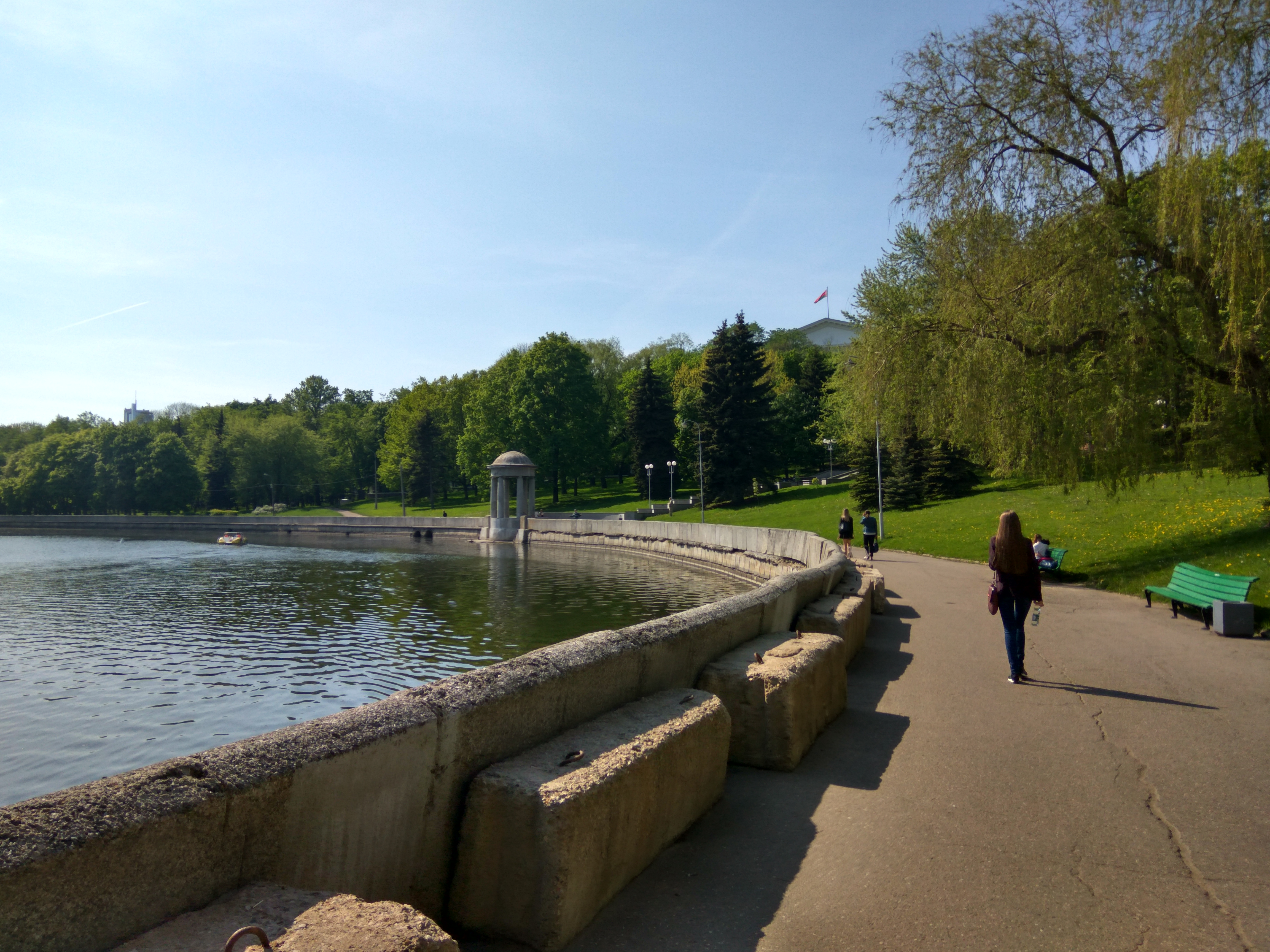 Мінск. Свіслач. Парк Марата Казея